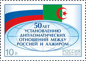 50 лет установлению дипломатических отношений между Россией и Алжиром